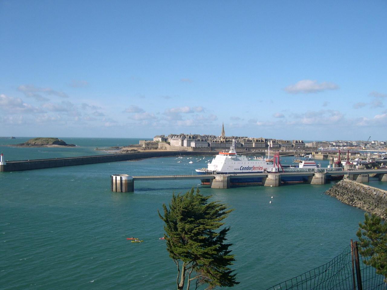 Vue du terminal du Naye à Saint-Malo et d'un bateau du Condor Ferries depuis la cité d'AlethTerminal du Naye with one of the Condor Ferries, in background old city of Saint-Malo and Grand Bé